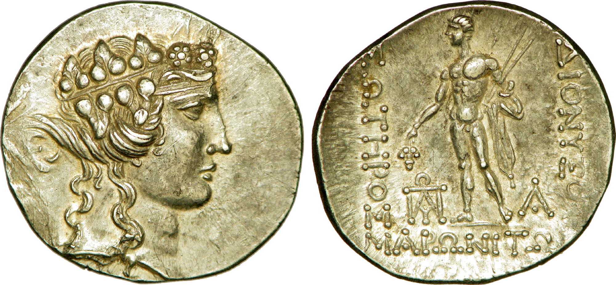 Nom de l'atelier : Maronée Métal : argent Diamètre : 30,5mm Axe des coins : 12h. Poids : 16,51g. Titulature avers : Anépigraphe. Description avers : Tête de Dionysos à droite, portant une couronne de feuilles de vigne et de lierre, les cheveux longs. Description revers : Dionysos nu, le manteau sur l'épaule gauche, tenant de la main droite, une grappe de raisin et de la gauche deux javelines ; de chaque côté un monogramme. Légende revers : DIONUSOU // SWTHRO[S] // MARWNITW[N]/ (WPA) - A